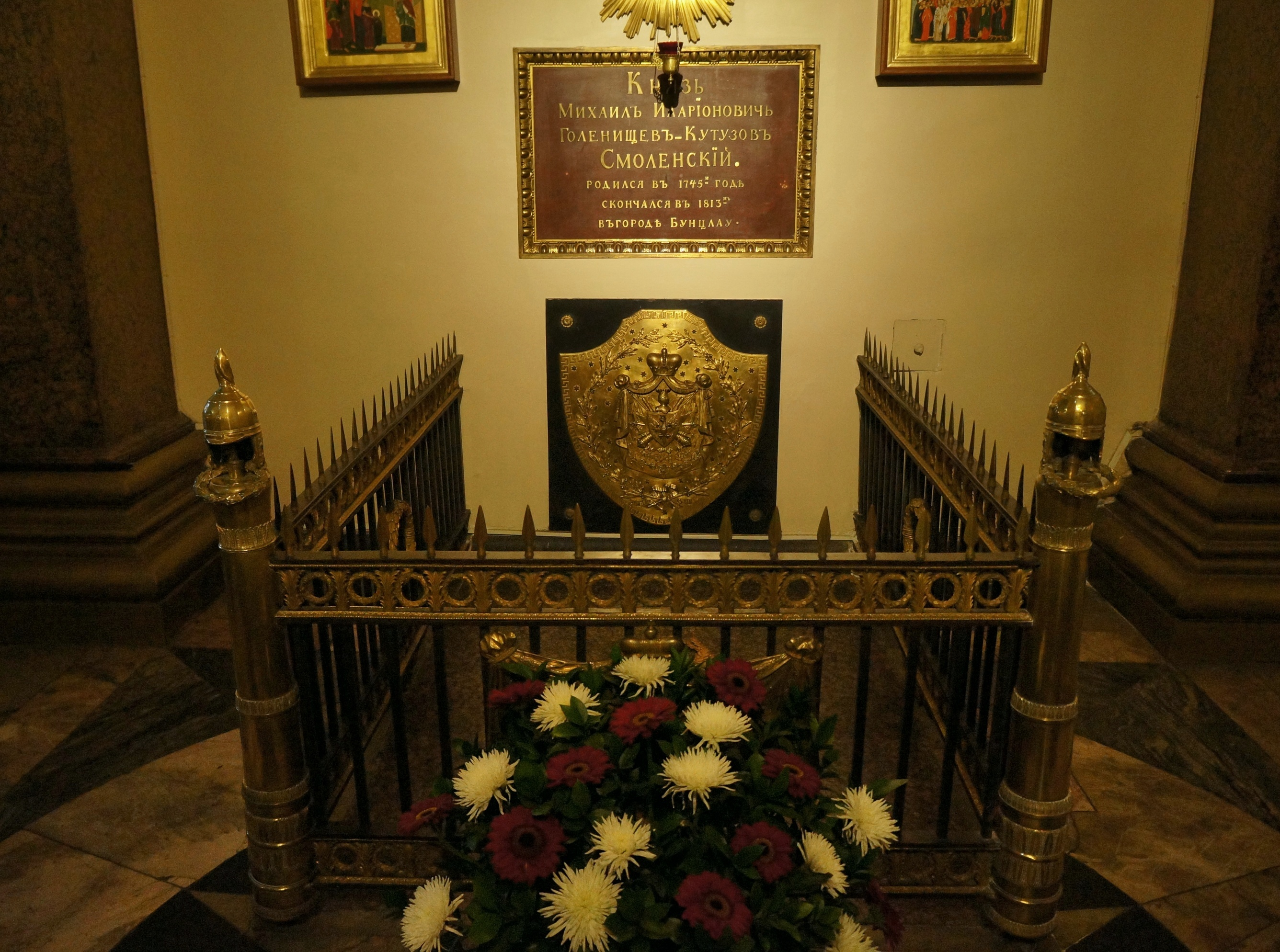 Гробница Кутузова в Казанском соборе. Санкт-Петербург, Россия.